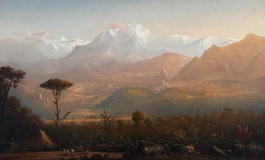 Norton Bush The Heart of the Peruvian Andes—A View from the Arequipa Valley with Mount Chachani in the Distance, Peru Oil on canvas 111.8 x 184.2 cm (44 x 72 1/2 inches) Colección Patricia Phelps de Cisneros